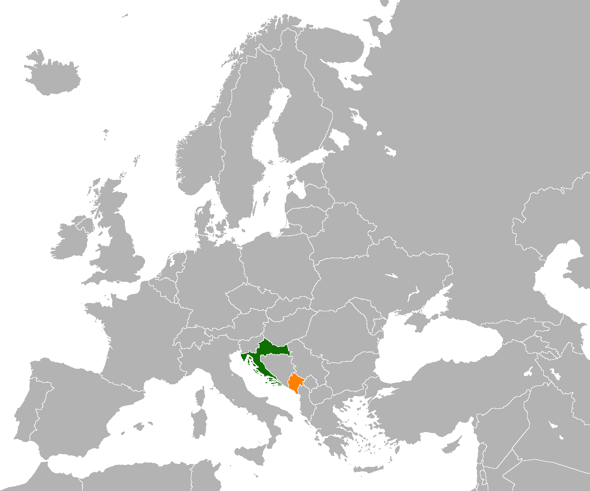 Croatia-Montenegro locator map.